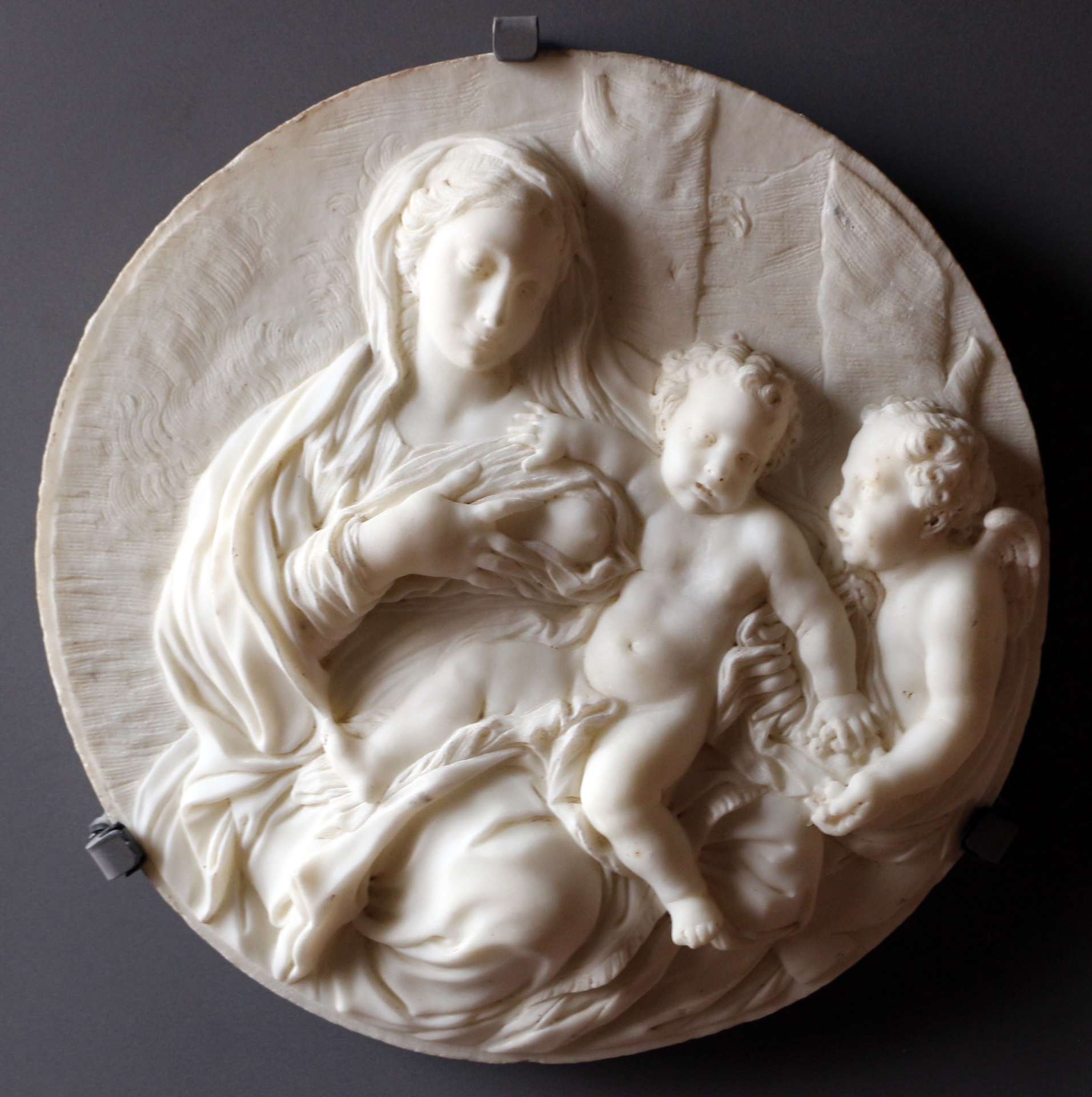 Museo di Casa Romei This is a photo of a monument which is part of cultural heritage of Italy.